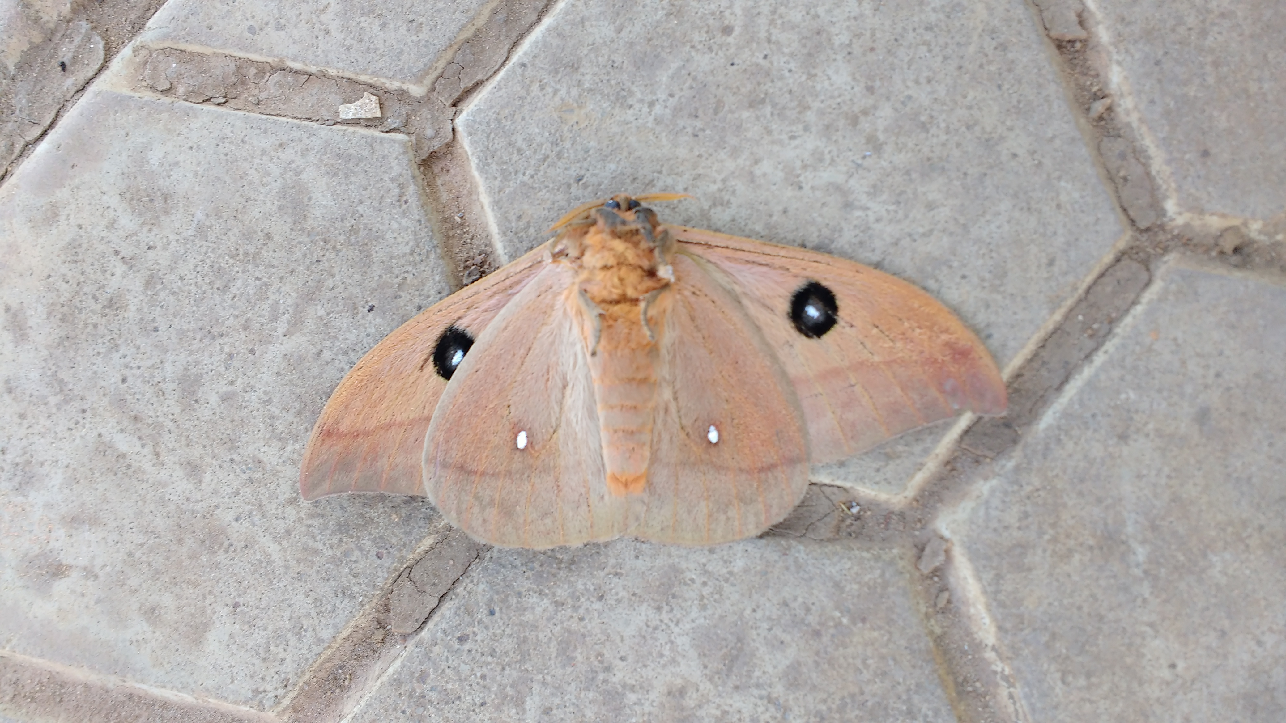 Lado inferior de exemplar da mariposa Automeris hamata na cidade de Caetité, Bahia, Brasil.